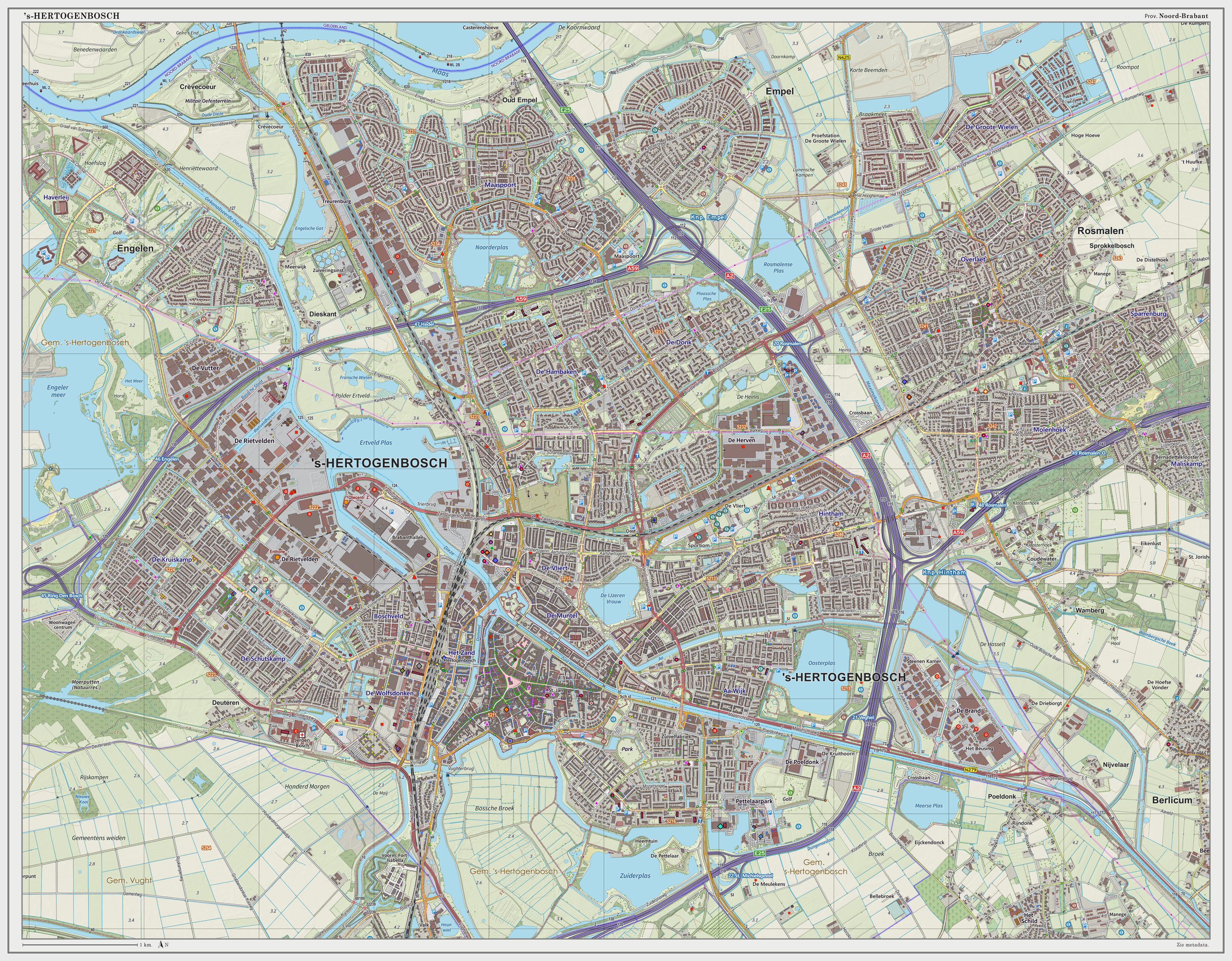 Topografische kaart van 's-Hertogenbosch (woonplaats). Resolutie: 300 pixels/km. Kaartbeeld samengesteld uit de open geodata van de Top10NL en Top25namen (Basisregistratie Topografie, Kadaster), Creative Commons BY licentie. Gebouwvlakken uit open geodata BAG extract. Wegen uit de OpenStreetMap. Reliëfschaduw uit de Actuele Hoogtekaart AHN2. Samenstelling en kleurenschema: Jan-Willem van Aalst, met QGIS2. Zie ook de Legenda.